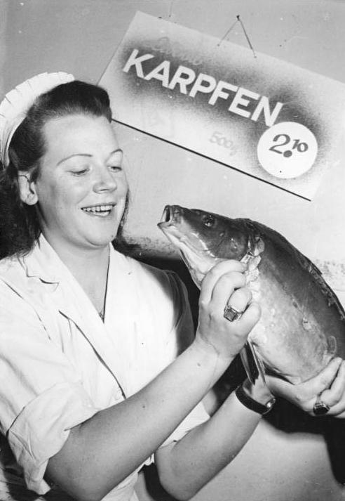 Neujahr, Silvesterkarpfen Karpfen in der HO. Ein grosses Angebot an Karpfen und Hechten hat jetzt die HO zum Verkauf aufgeboten. Hoffen wir das zu Sylvester auch solche "Burschen" zum Verkauf gelangen. ADN Nr. 256